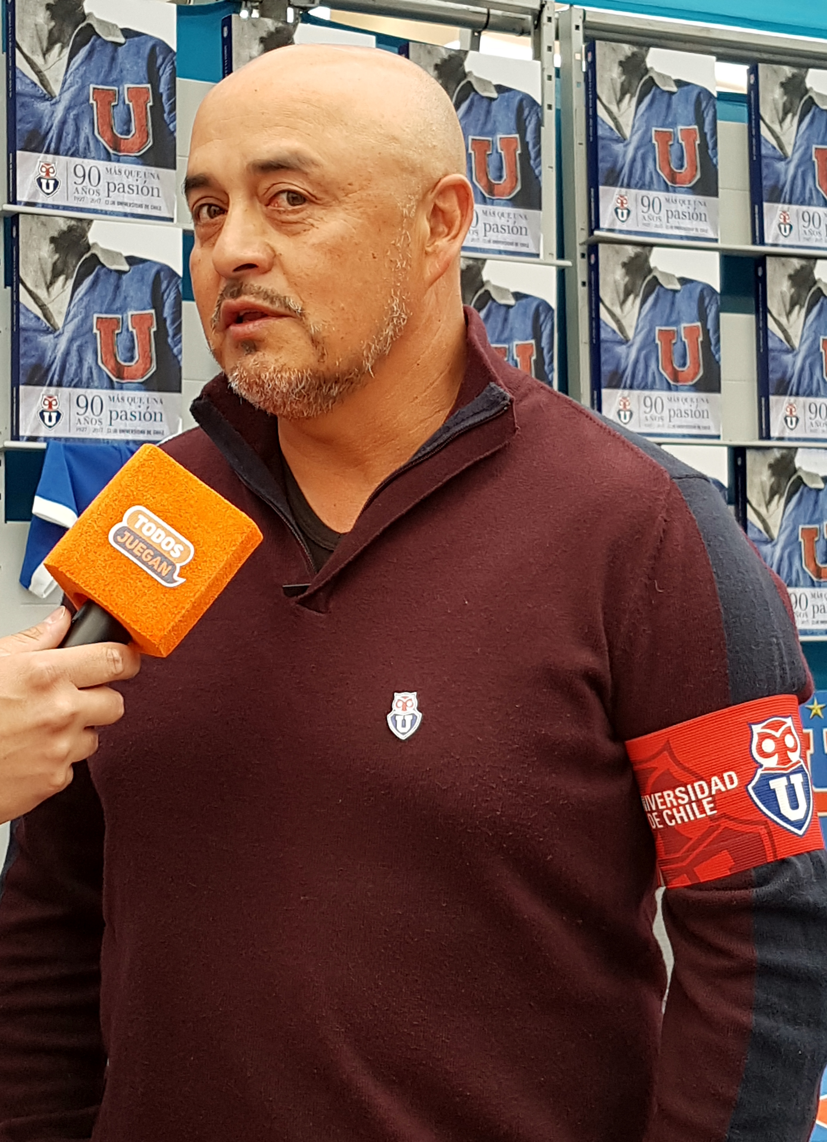 El entrenador chileno de fútbol Luis Musrri en la Feria Internacional del Libro de Santiago 2017.